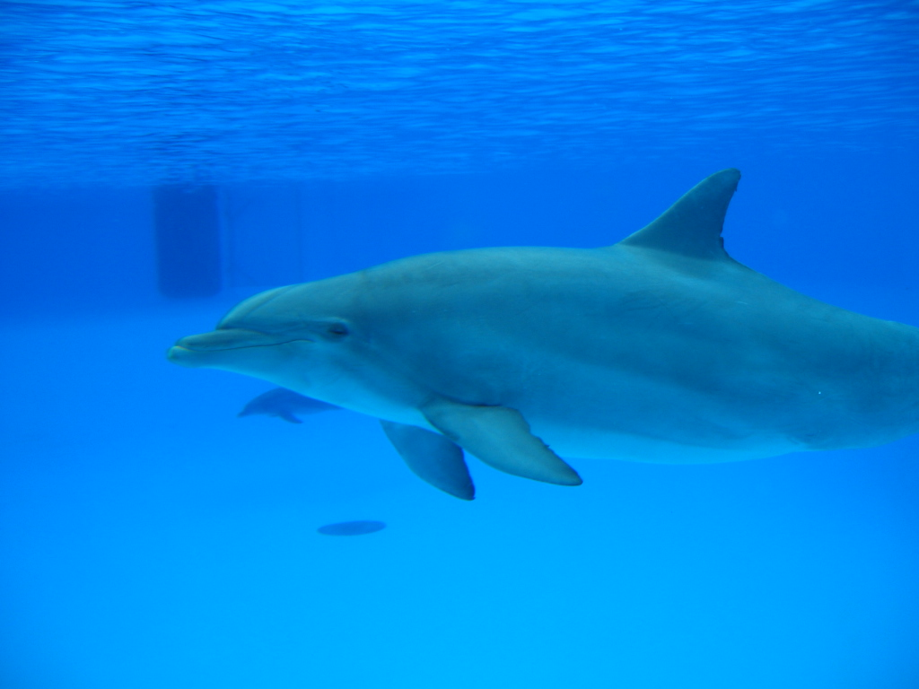 Parc Asterix - Paris - France